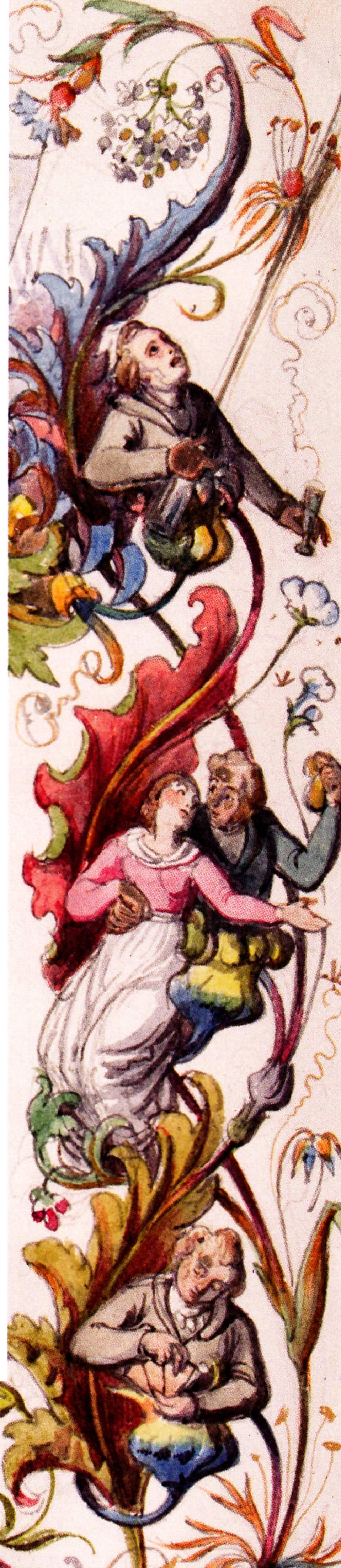 Arabeske, Eugen Napoleon Neureuther, Aquarell, 1831/32. Privatbesitz